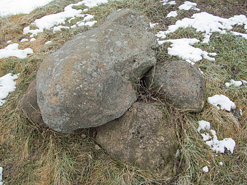 Акцябр. Месца былога касцёла